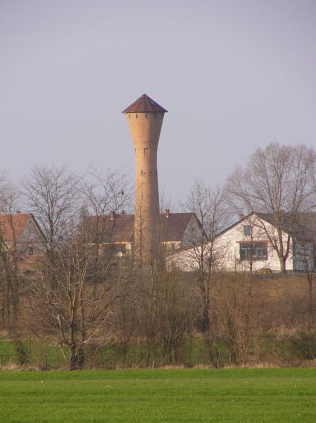 Érsekvadkerti víztorony